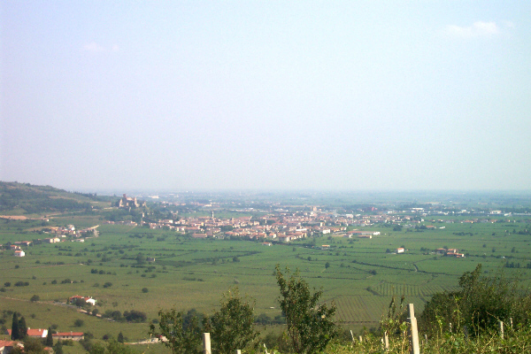 Scattata da Marinz nell'estate 2004. Foto del paese di Soave visto dai monti a settentrione.